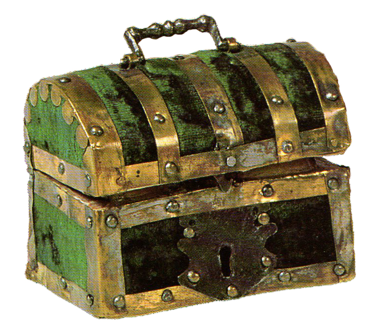 Bauletto (Tesoro delle Sante Croci, Brescia)